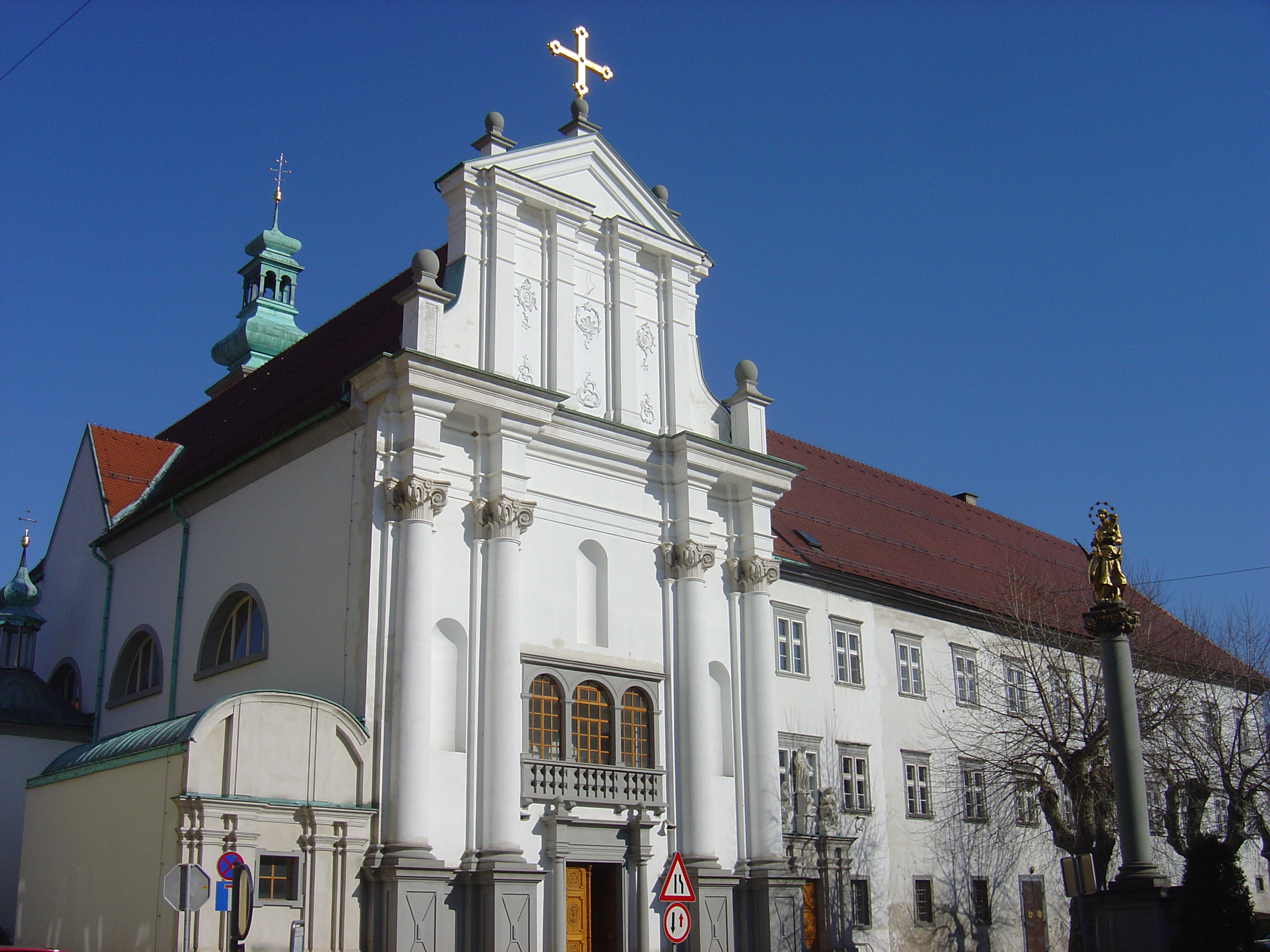 Ptuj, Slovenia